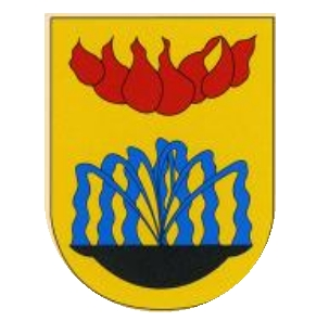 Wappen Michael Reepen *1959 Abt von Münsterschwarzach seit 2006